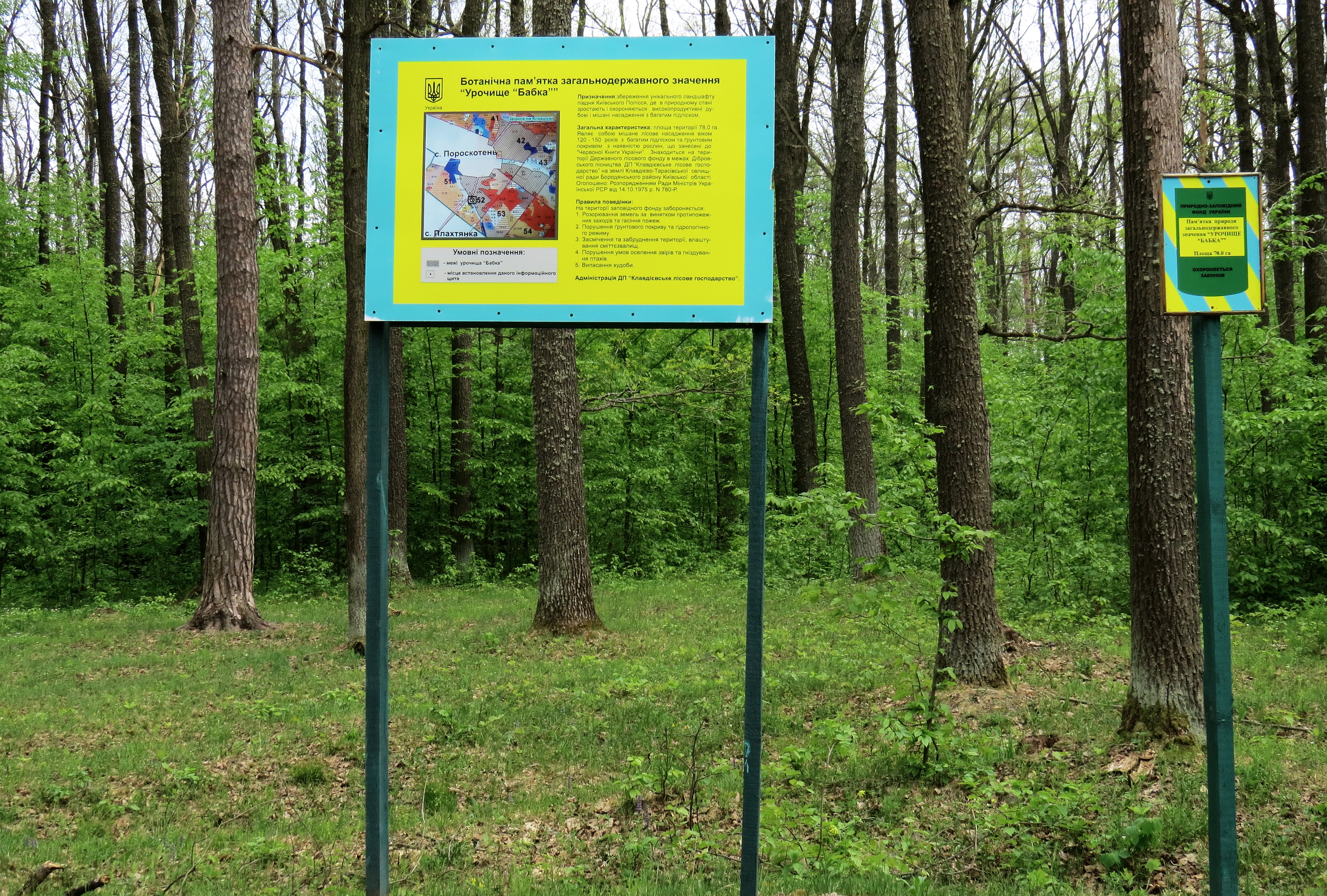 Пам'ятка природи «Урочище Бабка» біля с. Пороскотень Бородянського р-ну Київської обл. Інформаційний щит та охоронний знак.